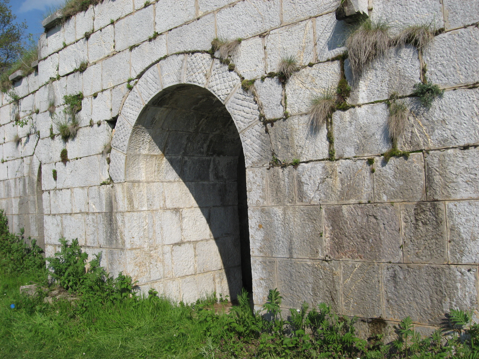 Јеремијино брдо, Лужница, Шанац, утврђење.